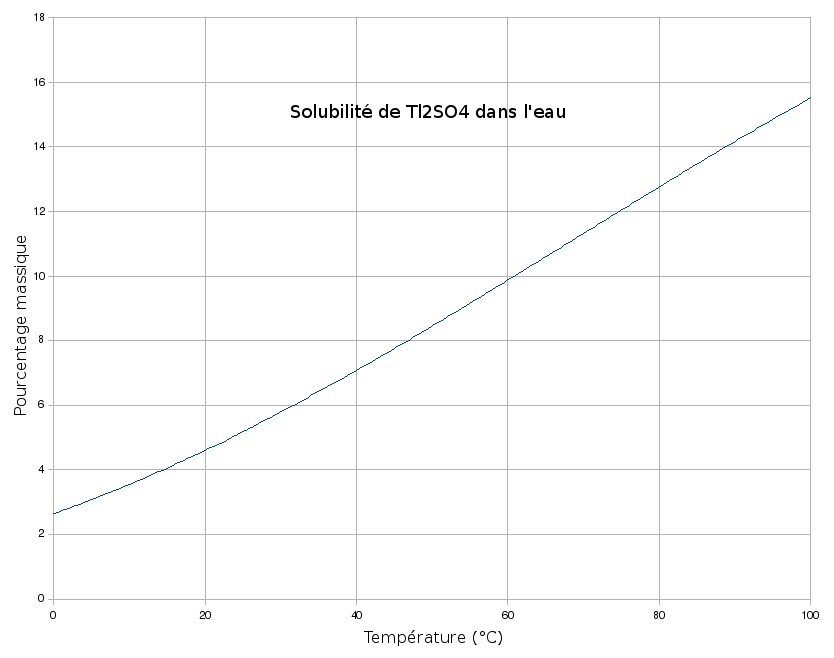 Solubilité du sulfate de thallium dans l'eau en fonction de la température